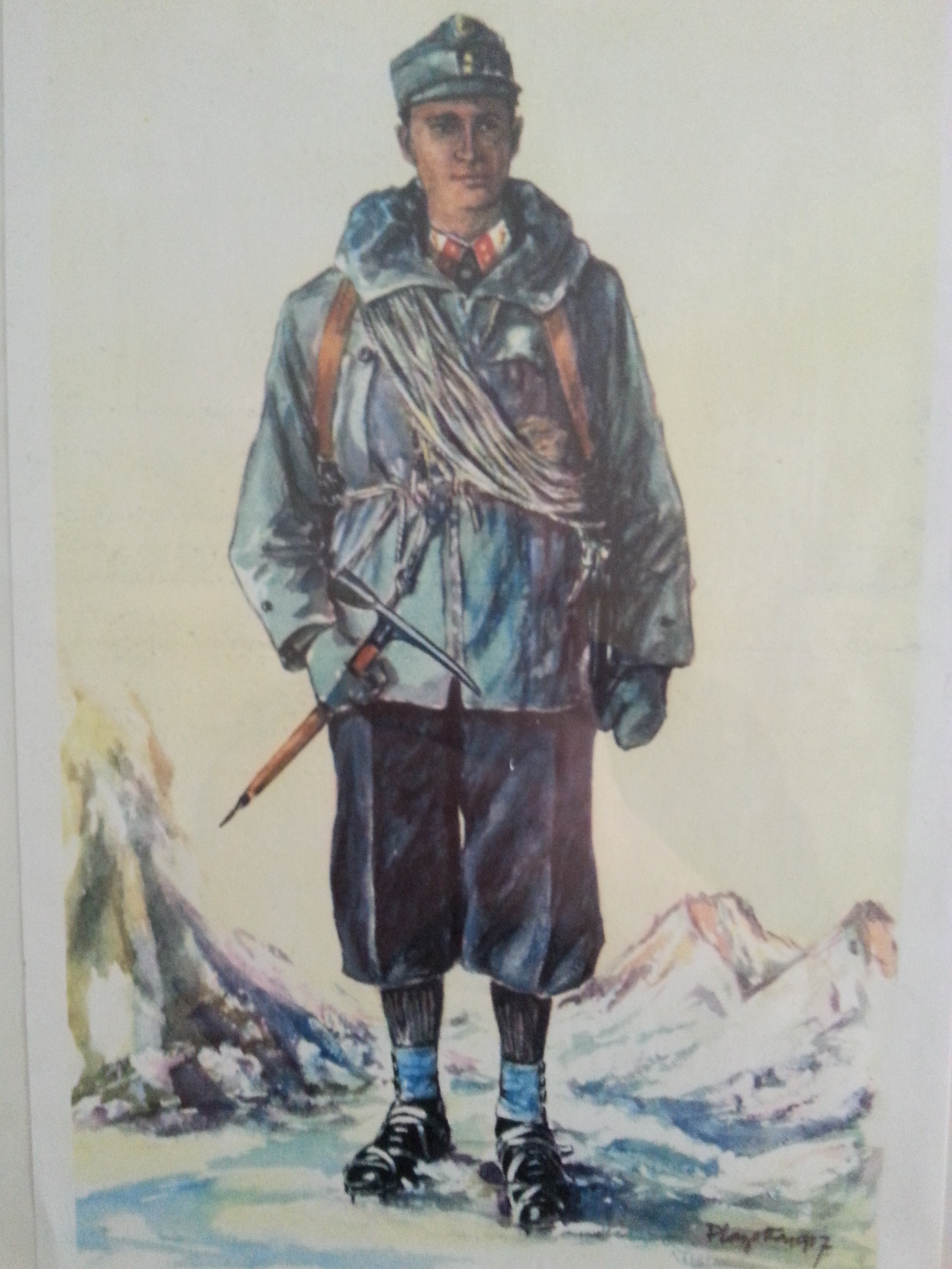 Österreichischer Alpingendarm, 1955.